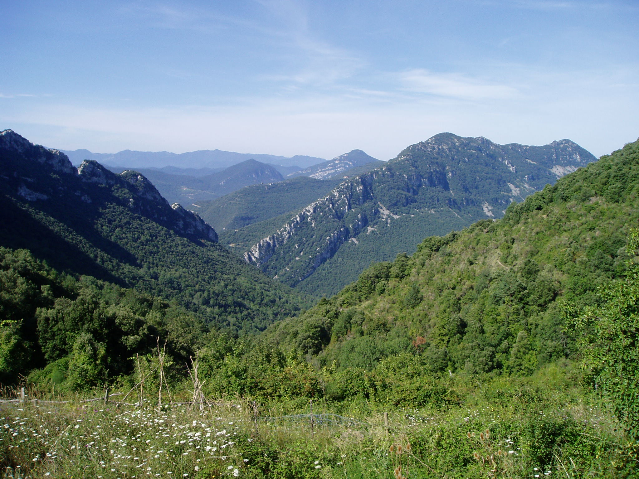 El valle de Hortmoier (Alta Garrotxa) desde Talaixà. Año:2004